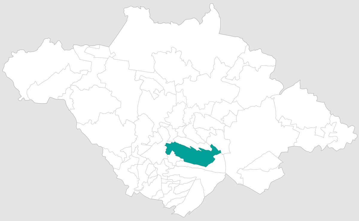 Actualización con los limites geograficos según INEGI